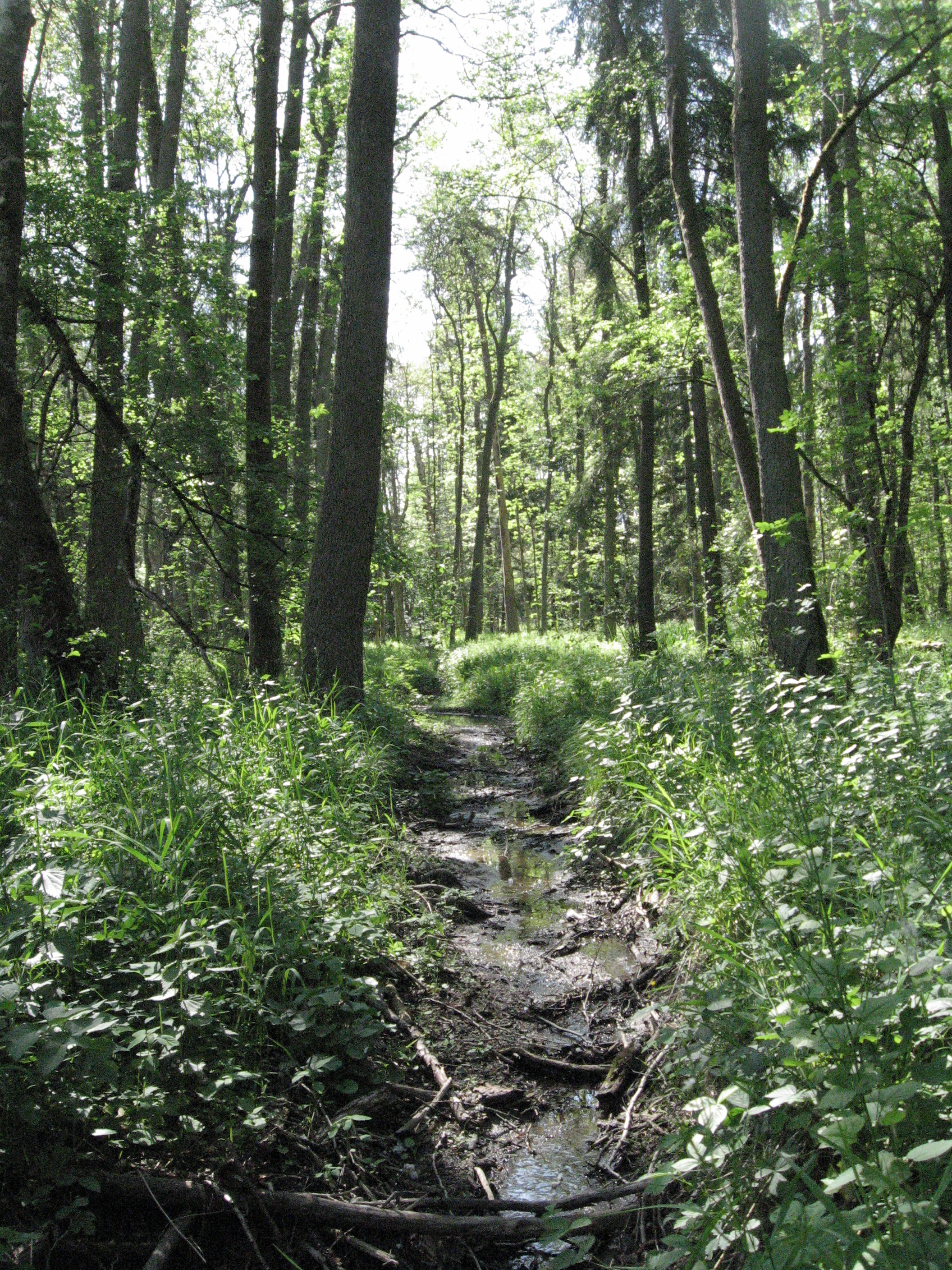 Lauf der Fischach Im Bruchwald des Waldgewanns Alte Fischach unterhalb des Bombensees. Blick bachaufwärts nach WNW im späten Mai.